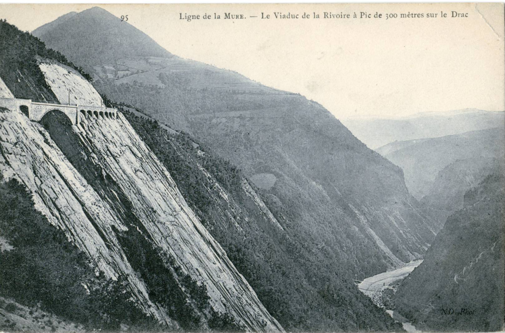 Carte postale ancienne éditée par ND, n°95 : Le Viaduc de la Rivoire à pic de 300 m. sur le Drac Chemin de fer de la Mure